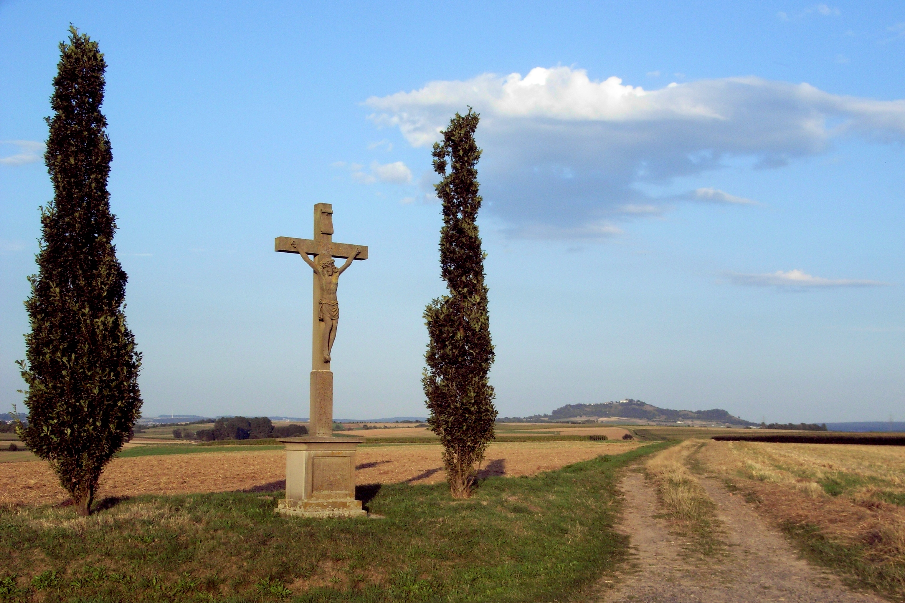 Zwischen Marburg-Bauerbach und Marburg-Schröck steht an der K35 ein Wegekreuz aus Sandstein, das besonders zum christlichen Feiertag Christi Himmelfahrt angestrebt wird. Es wurde 2001 durch die Stadt Marburg errichtet. Das zuvor dort befindliche Wegekreuz, das 1902 von Pfarrer Ingnaz Christian Danz (* 11.01.1833, Salmünster; + 21.04.1919, Schröck) errichtet wurde, musste durch witterungsbedingte Zerstörungen entfernt werden. Zuvor stand bereits ein Wegekreuz, über das wenig bekannt ist. Das Wegekreuz zeigt den gekreuzigten Jesus Christus. Zu beiden Seiten befinden sich zwei junge Pappeln. Die zuvor dort stehenden alten Pappeln, die 1952 von Danz gepflanzt worden waren, wurden im September 2009 aufgrund von Pilzbefall gefällt. Im Sockel befindet sich eine gemeißelte Inschrift mit dem Text: "Suche dir keinen anderen Weg als diesen königlichen Weg des heiligen Kreuzes. Imitat. Chr. II 12.6." Im Hintergrund des Bildes zu sehen: Amöneburg.